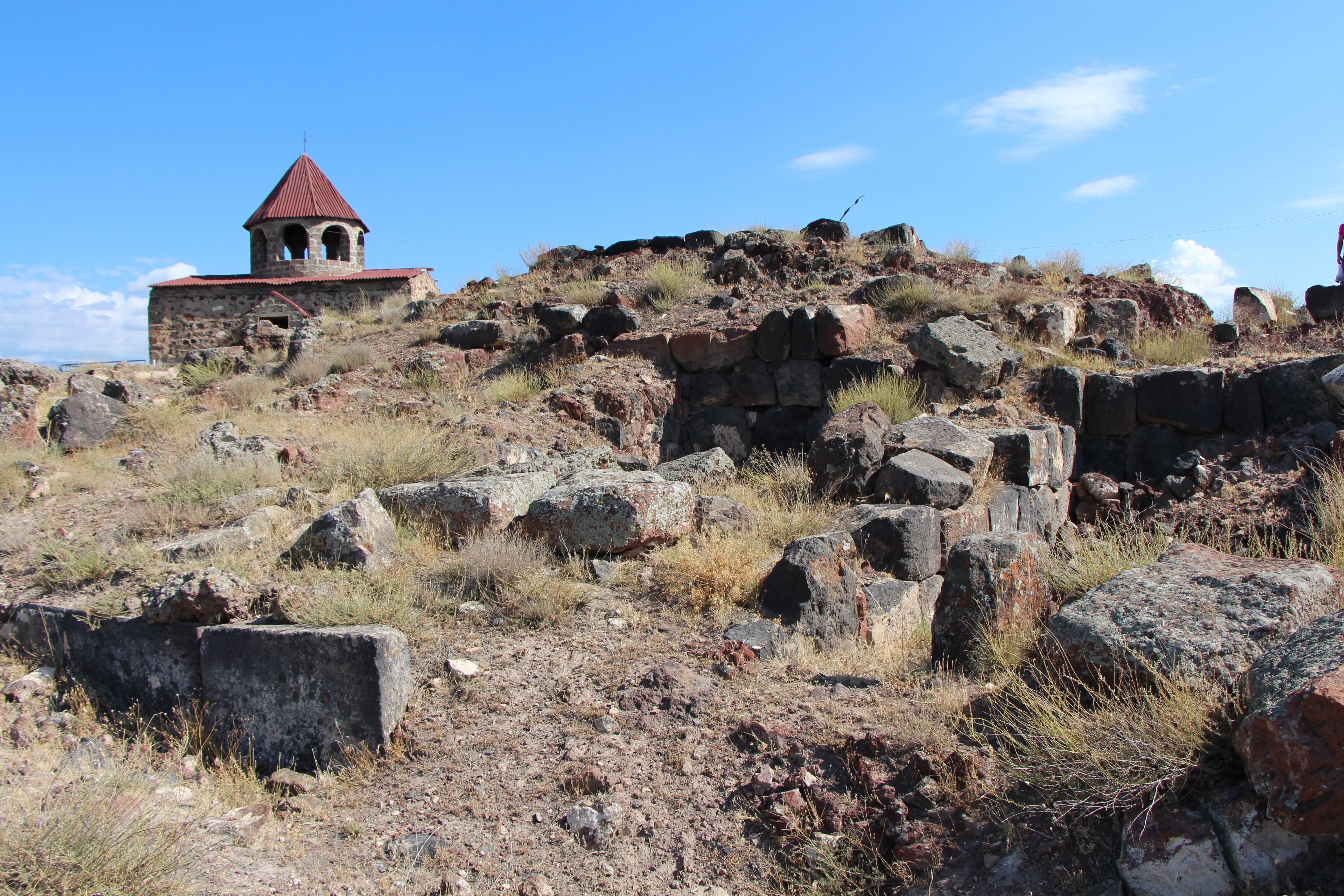 Օշական, Արագածոտնի մարզ, դամբարանադաշտ մ.թ.ա. 1 հզմ 2.113/2.1 ամրոցի ներսում 113/2.1